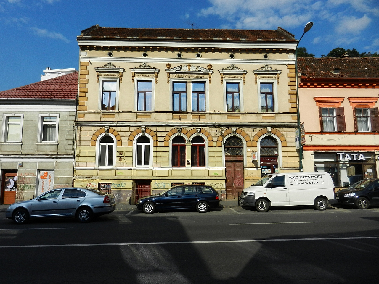 Casa monument istoric (Lunga 32)